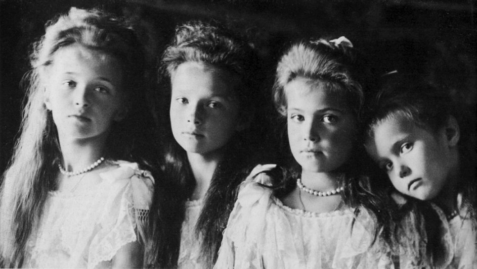 Anastasia, Maria, Olga, Tatjana Nikolaevna